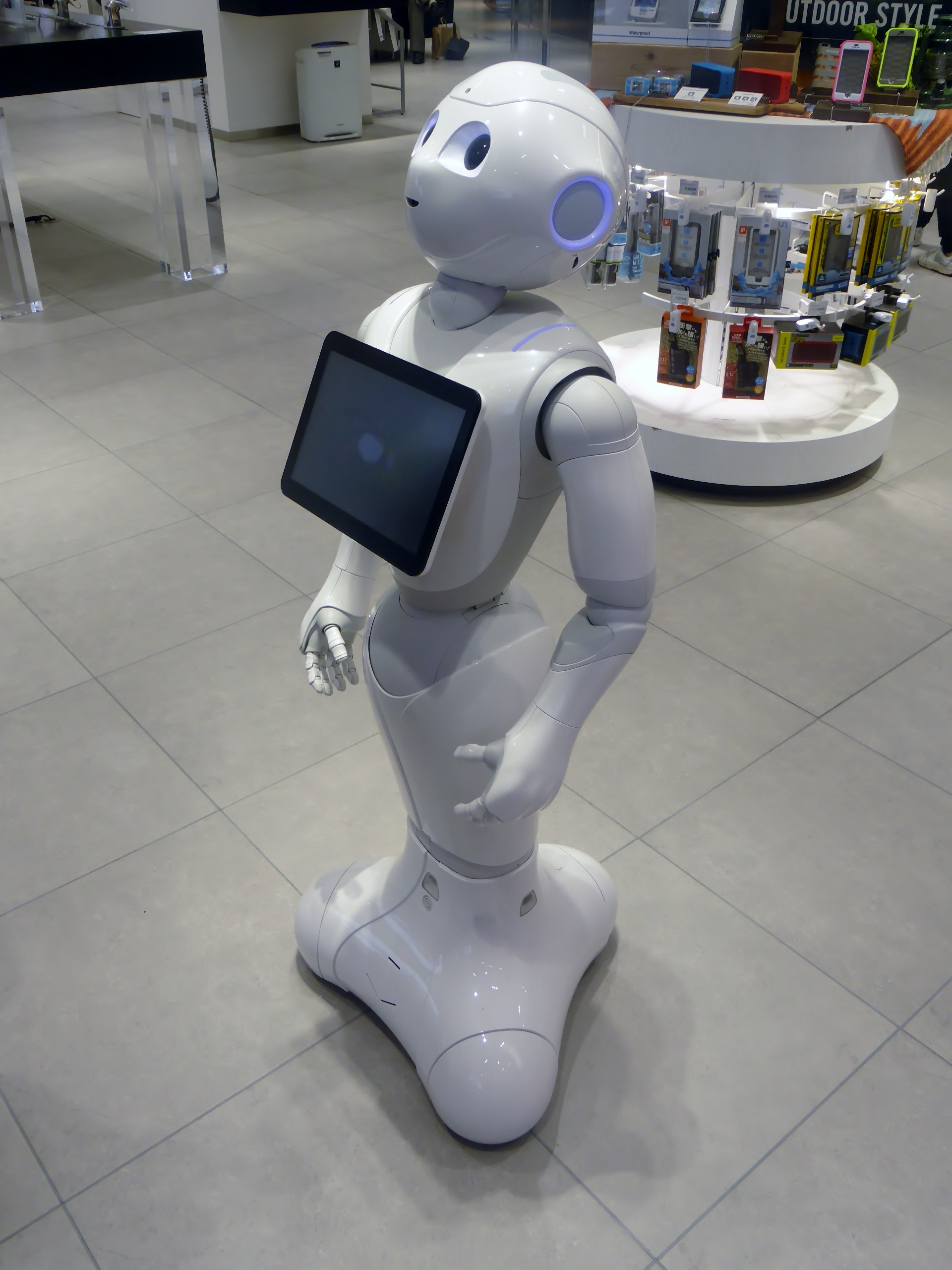 ソフトバンクのロボット・ペッパーを撮影。